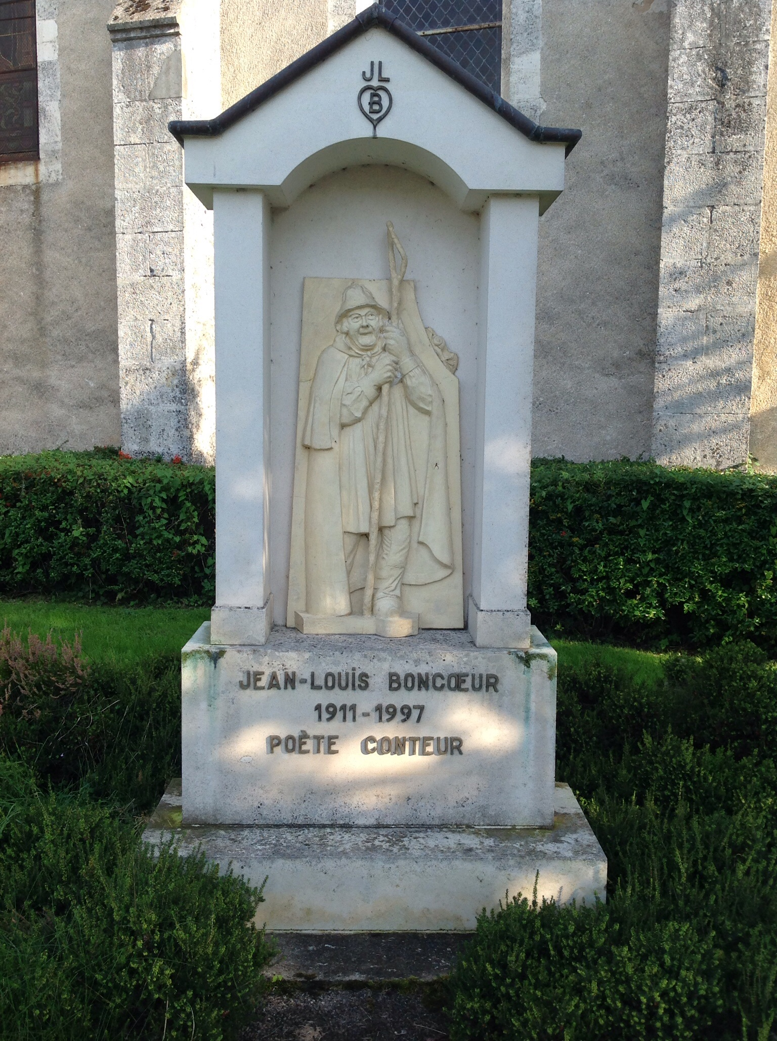 Stèle Jean-Louis Boncœur